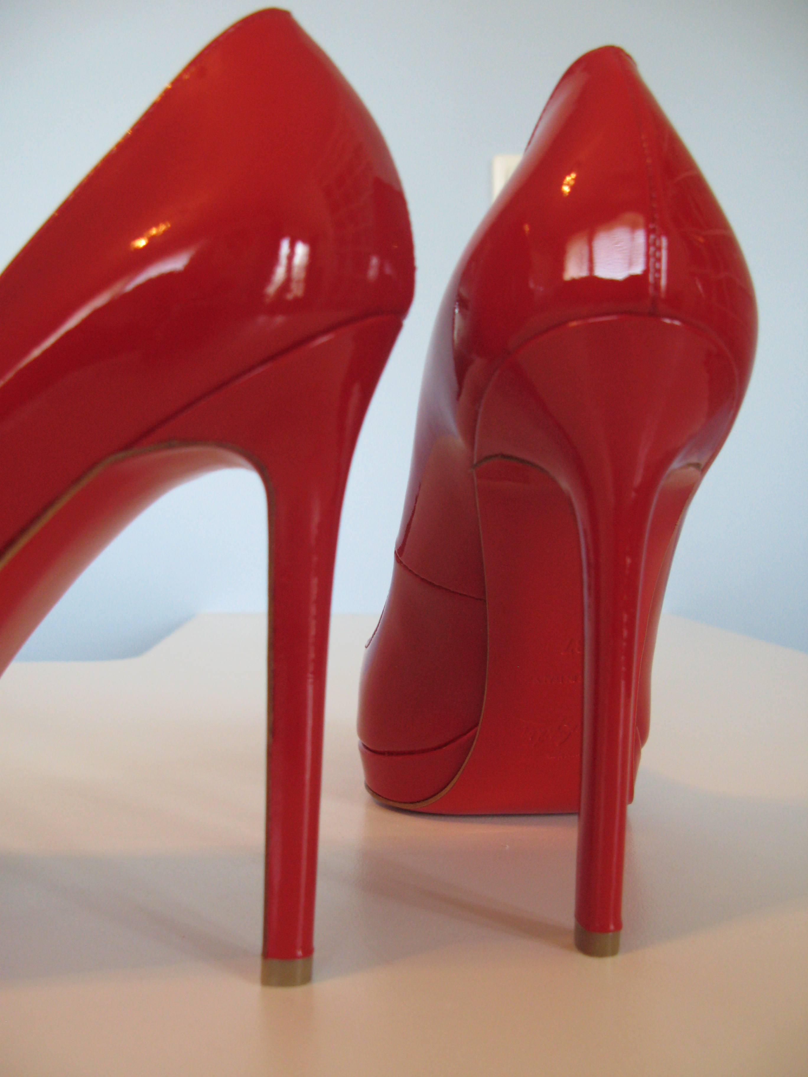 Chaussure Christian Louboutin, modèle Pigalle Plato 120mm, couleur "coquelicot" (détail)